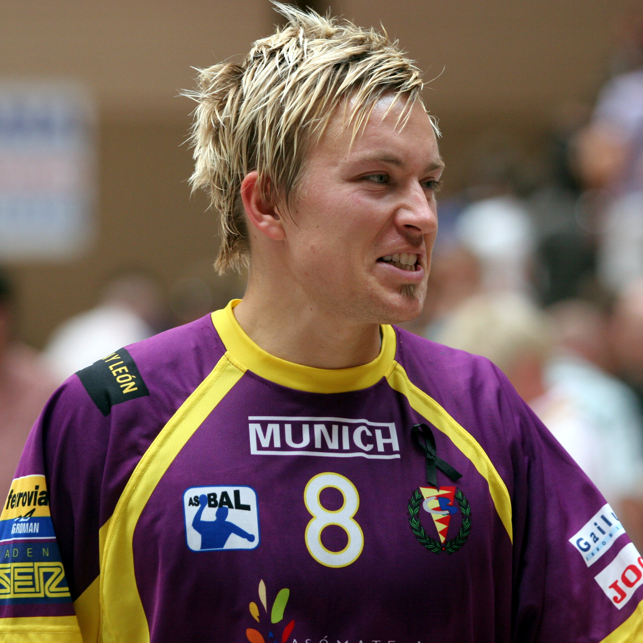 Håvard Tvedten, norwegischer Handballspieler bei BM Valladolid, am 30. August 2008 beim Schlecker Cup